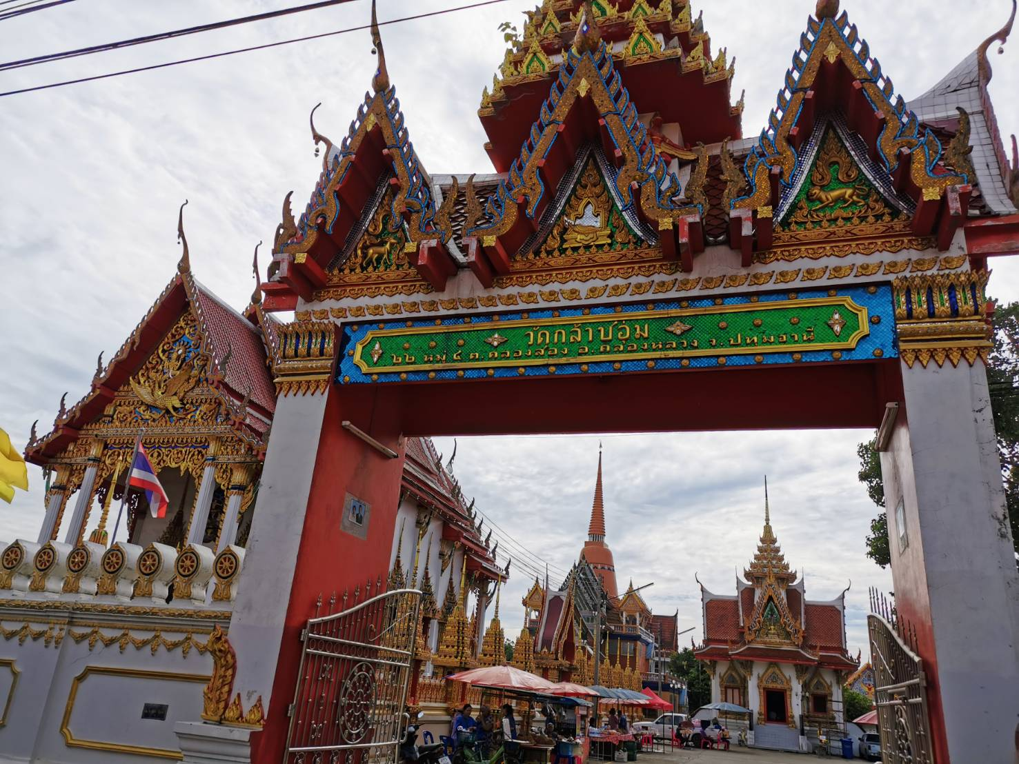 วัดกล้าชอุ่ม ถนนเลียบคลองสอง ต.คลองสอง อ.คลองหลวง จ.ปทุมธานี 12120